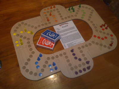 6 persoons keezbord